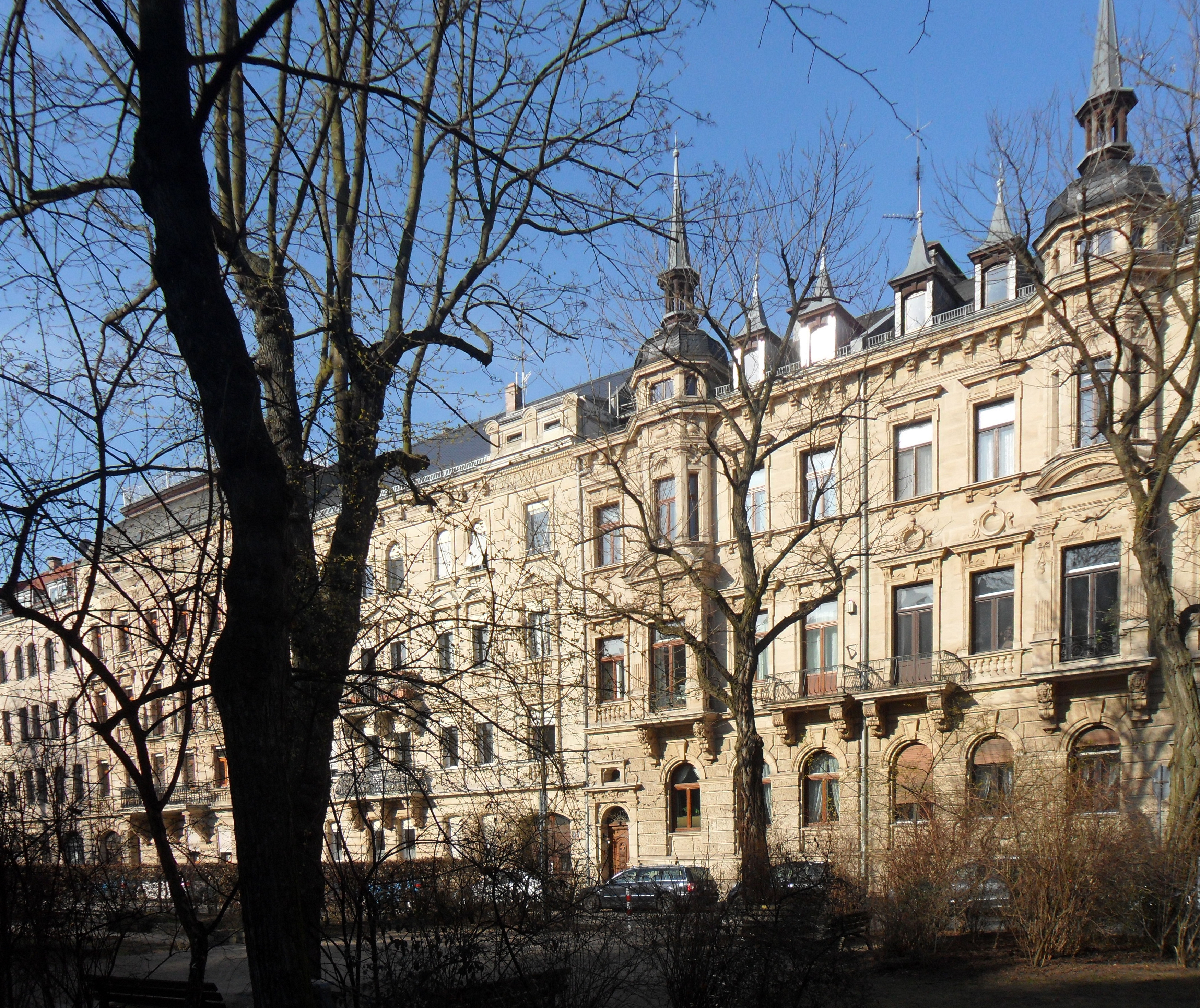 Hornschuchpromenade 1 bis 4